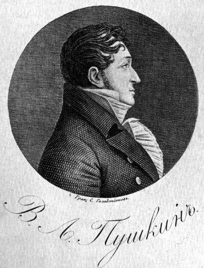 Пушкин Василий Львович // Морозов А.В. Каталог моего собрания русских гравированных и литографированных портретов. М., 1913?, Т.3.